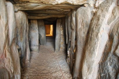 Monumento megalítico triguereño.